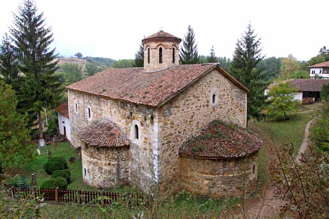 Манастир Суково